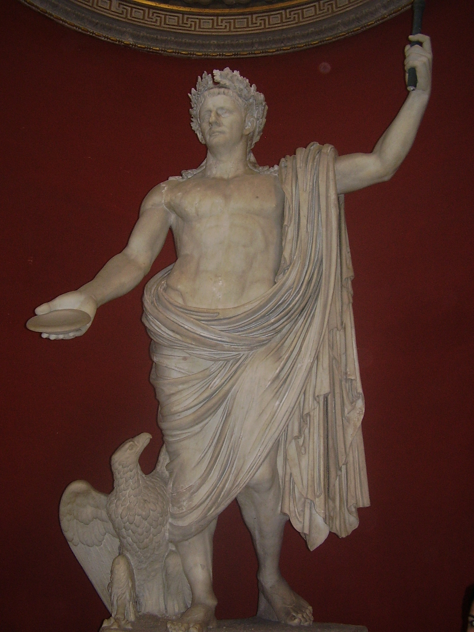 Statue Claudius in den Vatikanischen Museen ausgestellt